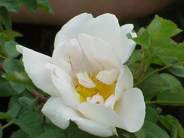 Species: Rosa moyesii Family: Rosaceae Cultivar: Nevada, Dot 1927 Image No. 1